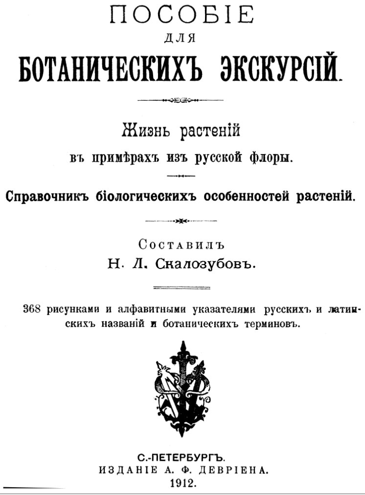 Николай Лукич Скалозубов (иногда Сколозубов[1]; 29 октября 1861, Кострома — 19 февраля 1915, Курган) — губернский агроном, общественный деятель, депутат II и III Государственной думы от Тобольской губернии (1907—1912).